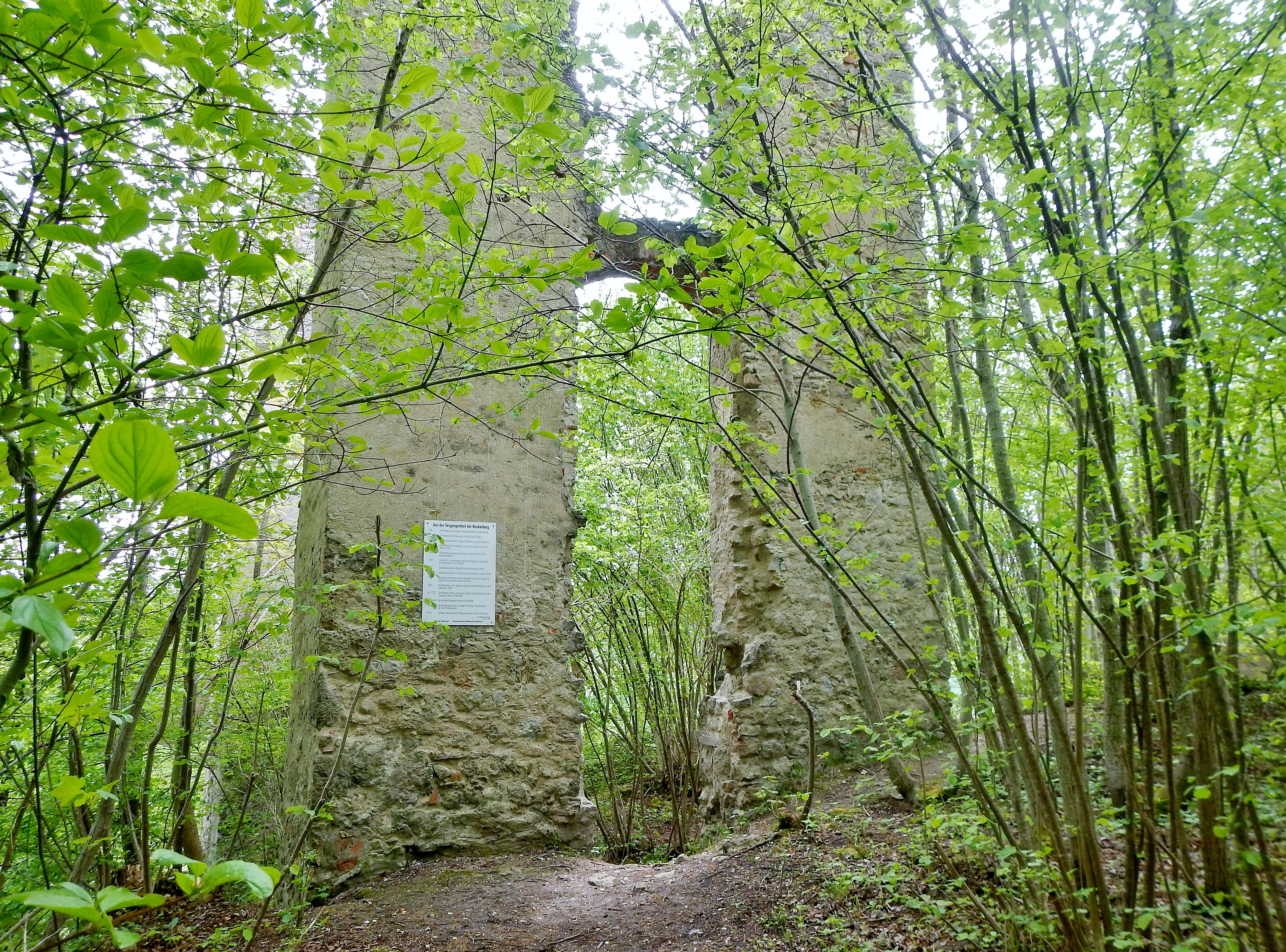 Beim 366 km langen Neckartalradweg: Neckarburg: 793 Die "Nehhepurc" wird erstmals im Besitz des Klosters St. Gallen erwähnt - 1275: Die Neckarburg erscheint mit eigener Pfarrkiche und eigenem Geistlichlen - 1589: Die Spreter von Kreidenstein kaufen die Neckarburg aus dem Vorbesitz der Grafen von Sulz und bauen Sie neu als Schloss